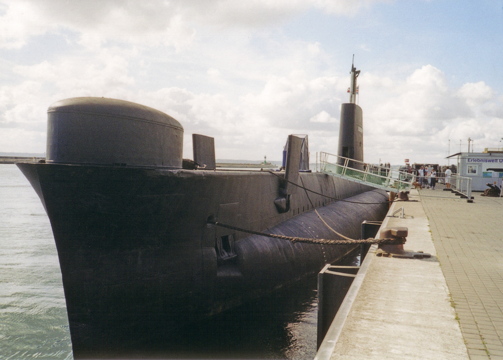 Beschreibung: HMS Otus im Sassnitzer Hafen Fotograf: Darkone, 2002